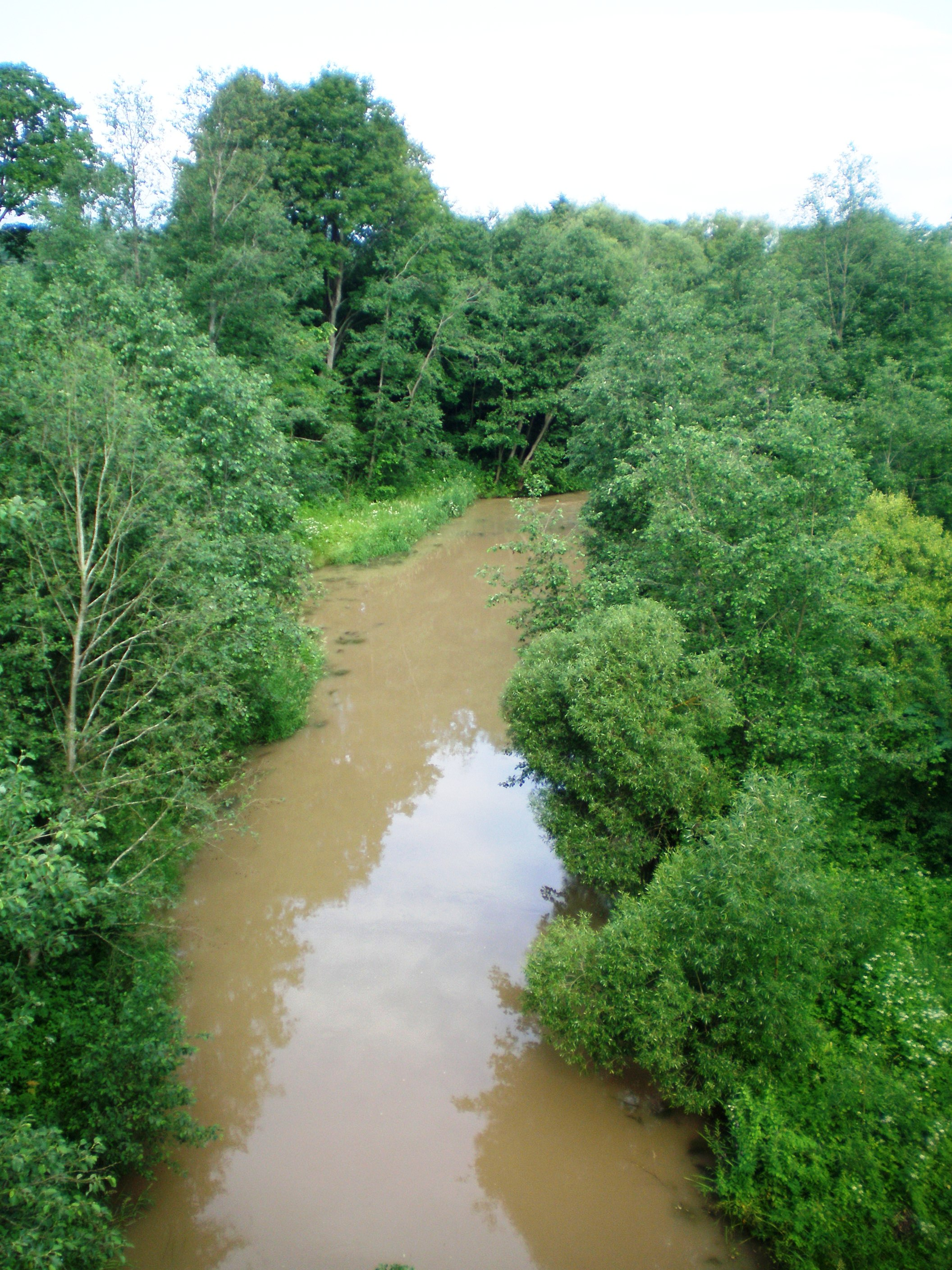 Verknė prie Jiezno, Prienų raj.